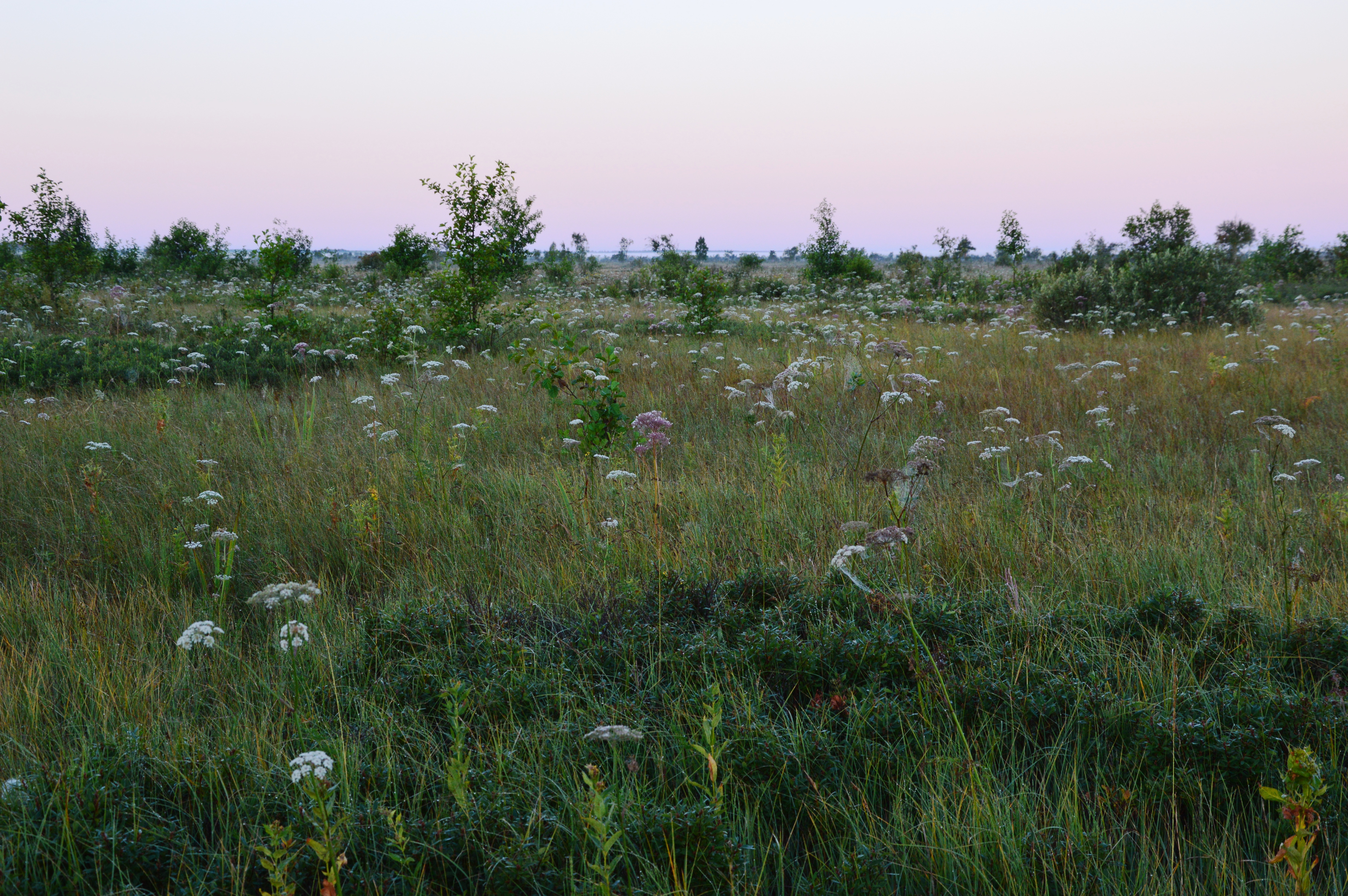 Avaste soo